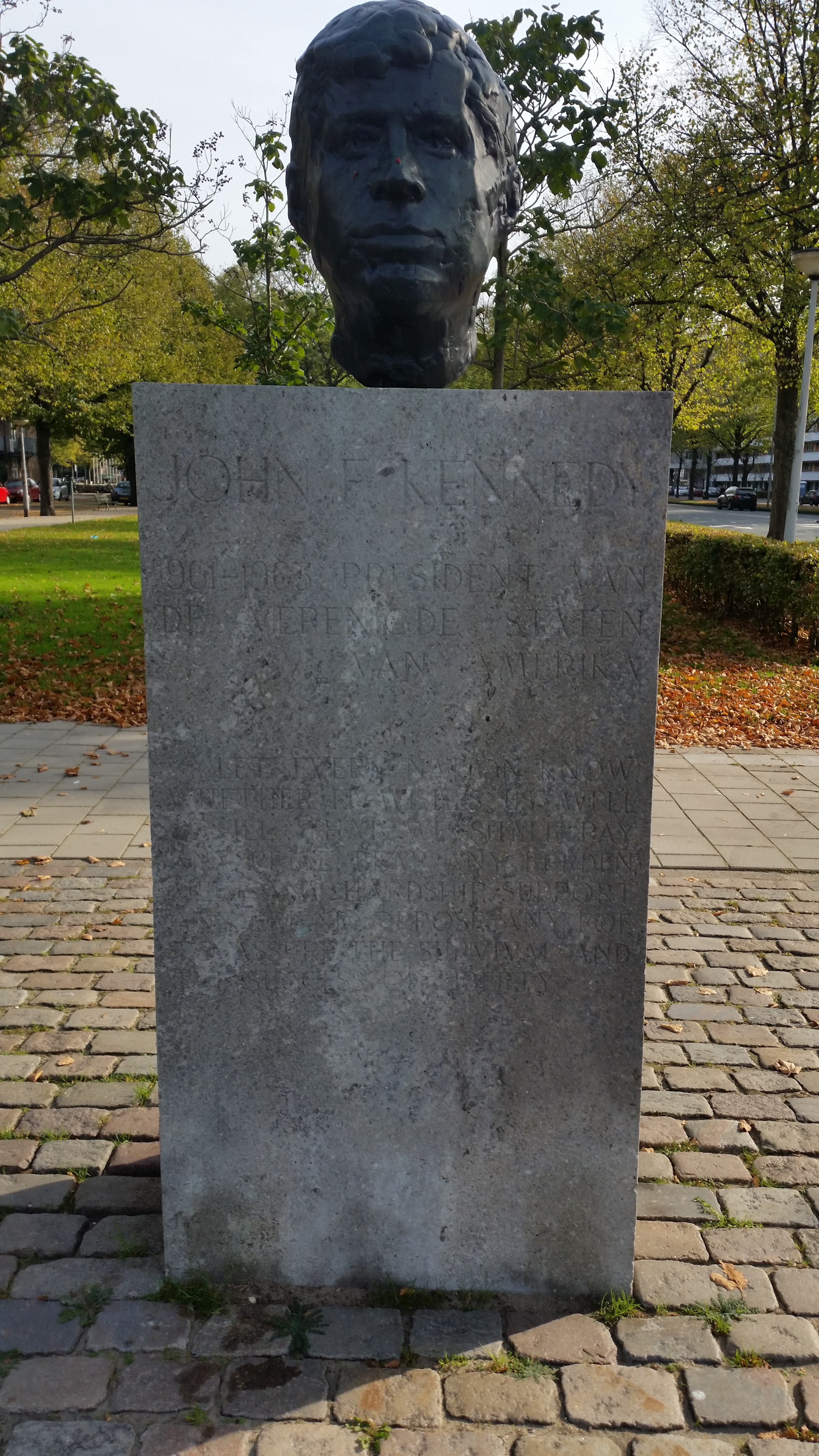 John F. Kennedy by Renze Hettema, vooraanzicht